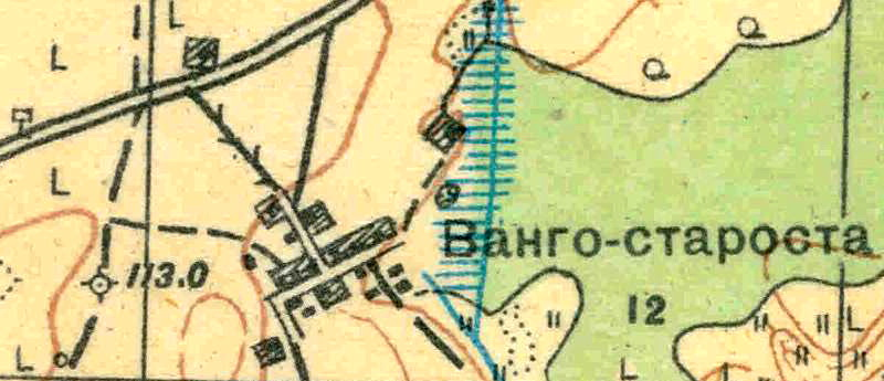 Топографическая карта Ленинградской области, квадрат О-35-24-Б-г (Б. Борницы), посёлок Новый Учхоз